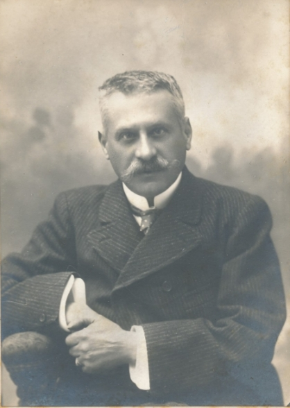 Il .Cr. Enrcio Pontremoli